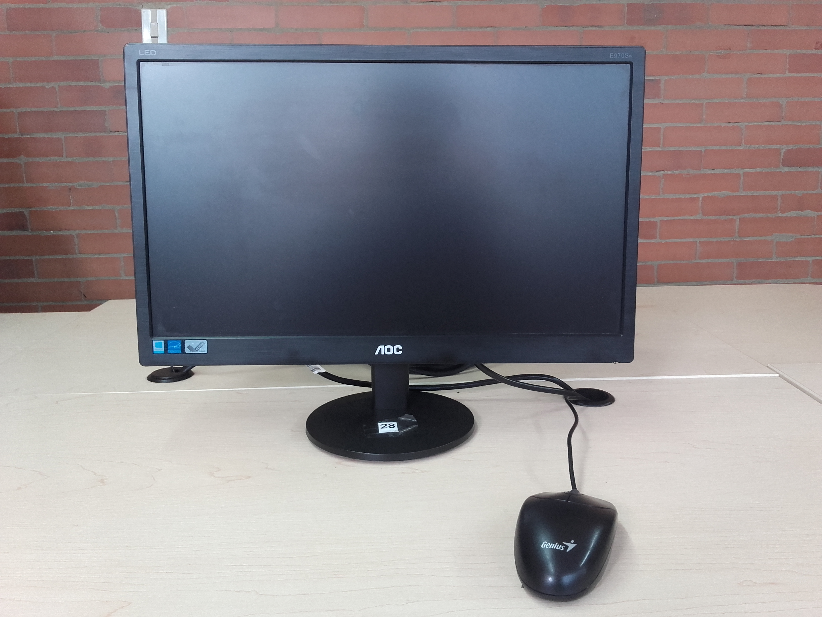 djjfjdjdjdjdkd